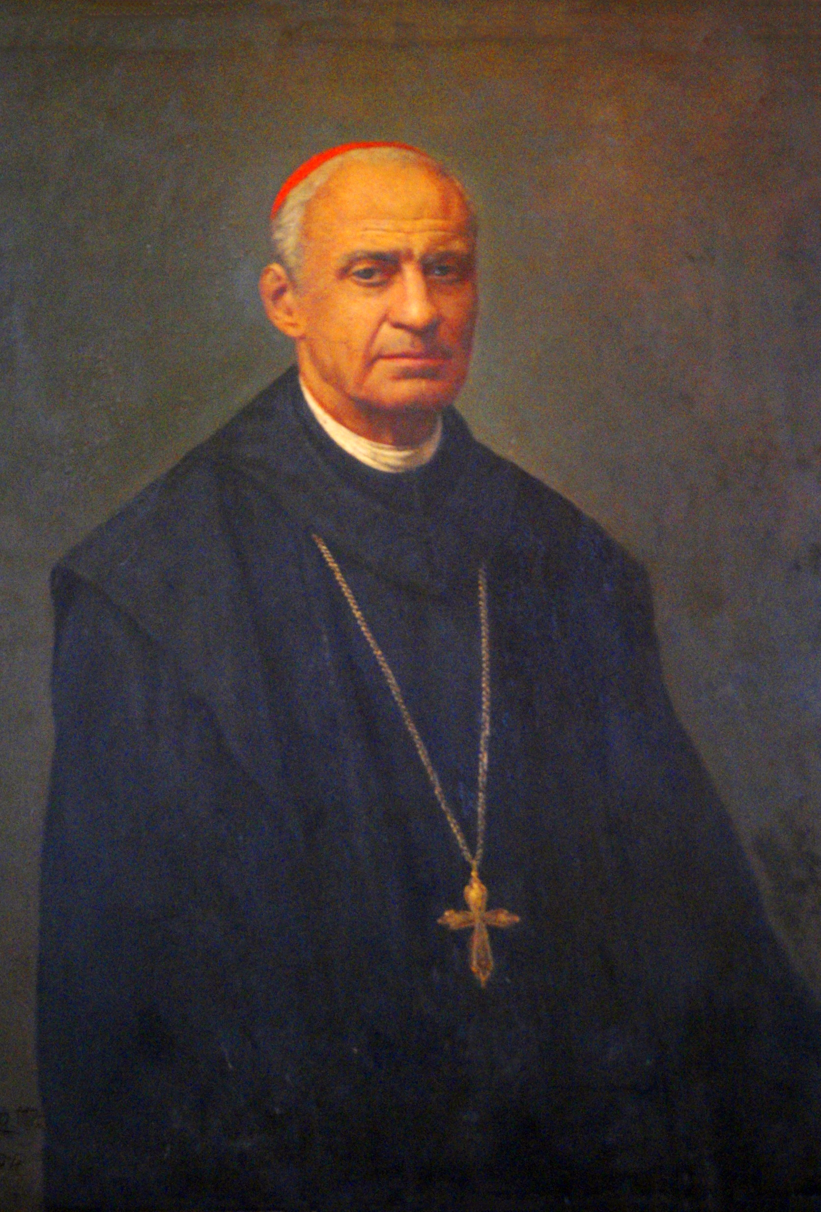 Ritratto del cardinale Giuseppe Benedetto Dusmet O.S.B.